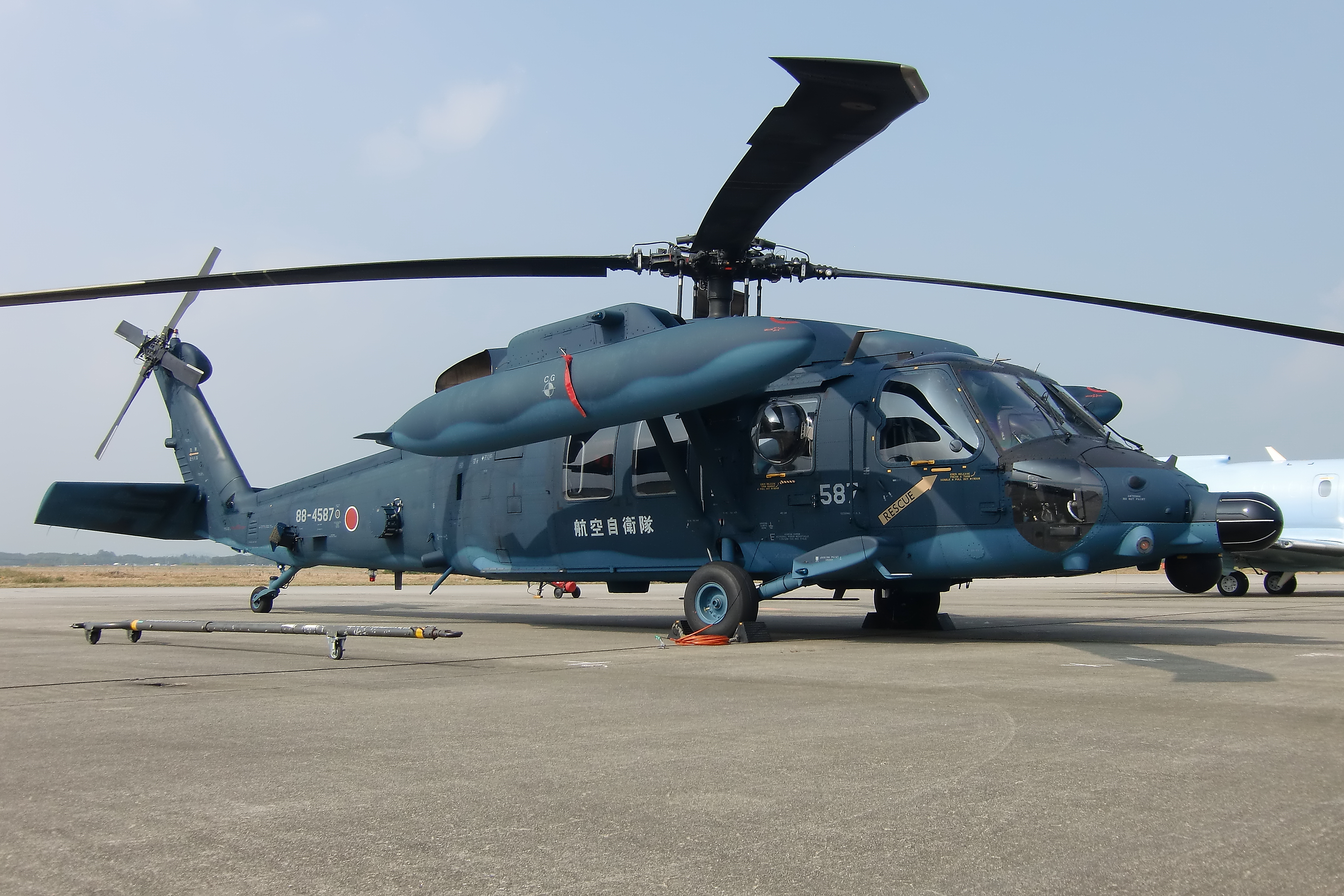 航空自衛隊 三菱 UH-60J 88-4587 築城基地